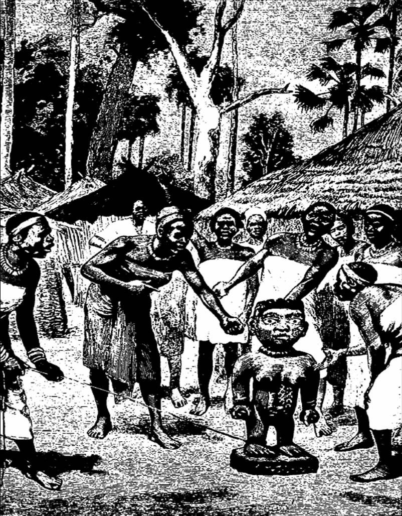 Carabane (Casamance, Sénégal) : "Les habitants de Carabane sortent alors les fétiches de leur retraite en les abreuvant d'injures" (lorsqu'il ne pleut pas malgré les incantations)